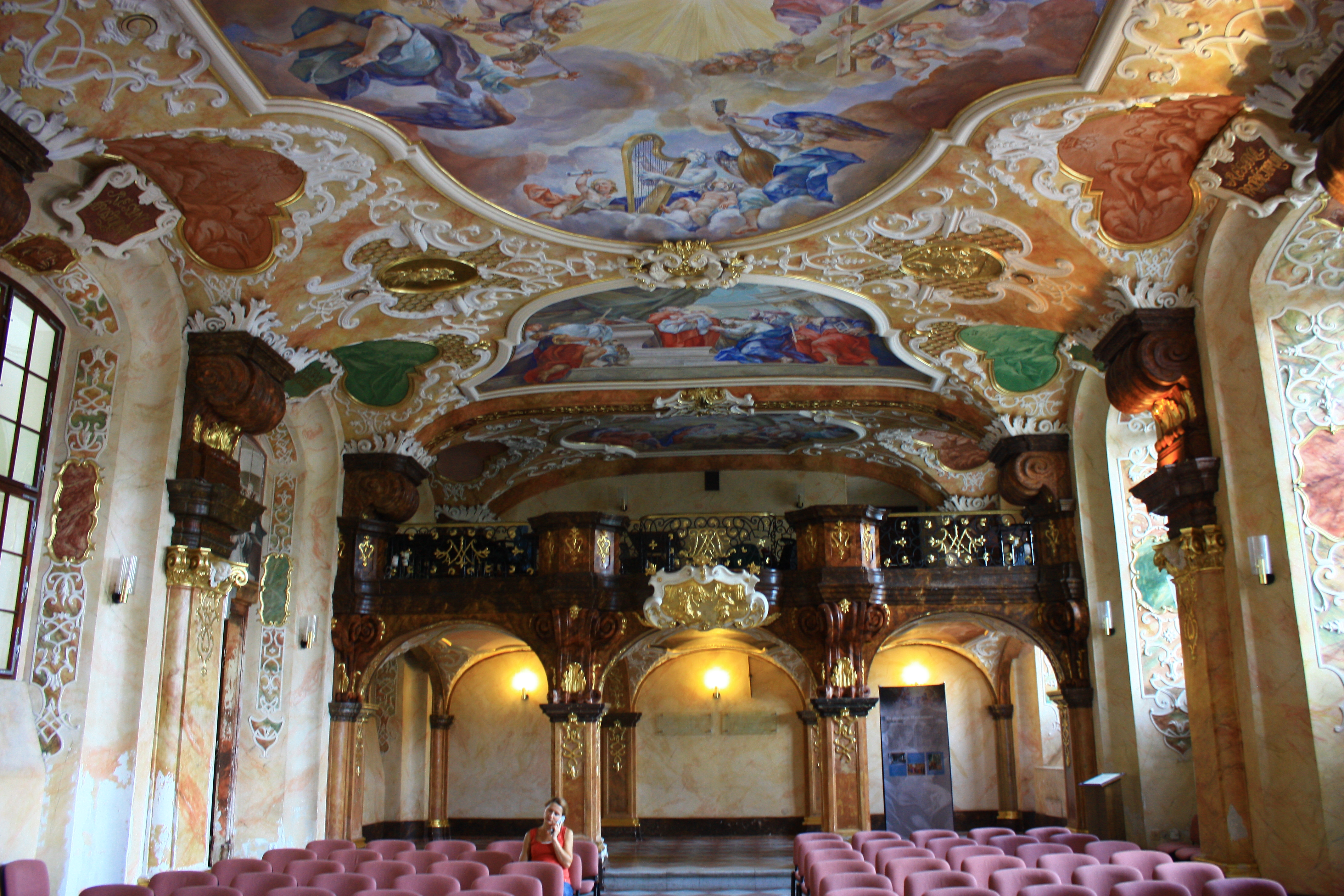 Wrocław, kolegium jezuickie, ob. Uniwersytet Wrocławski